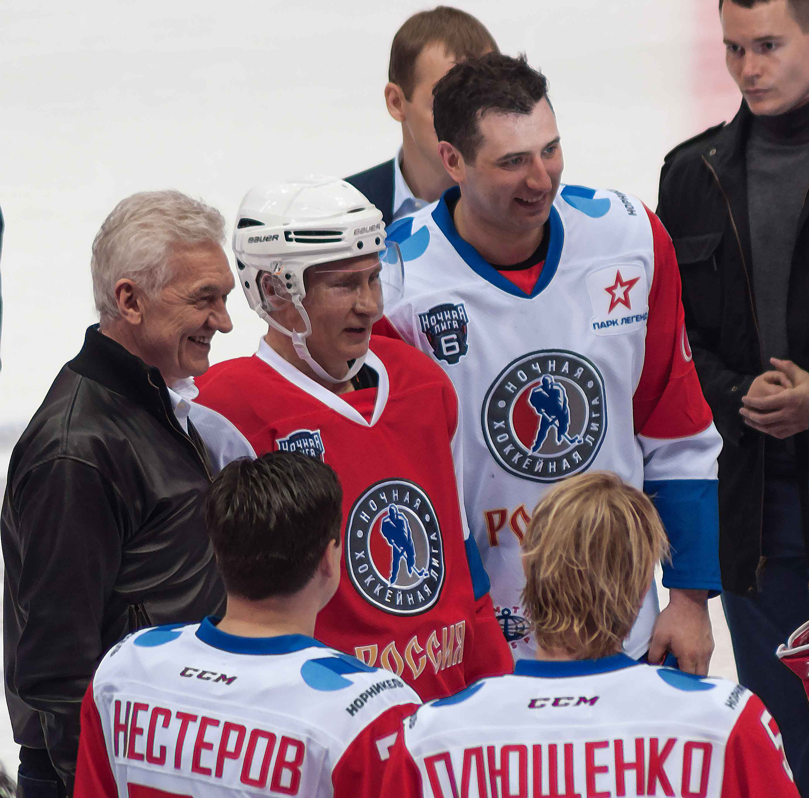 Гала-матч Ночной Хоккейной Лиги часть 2